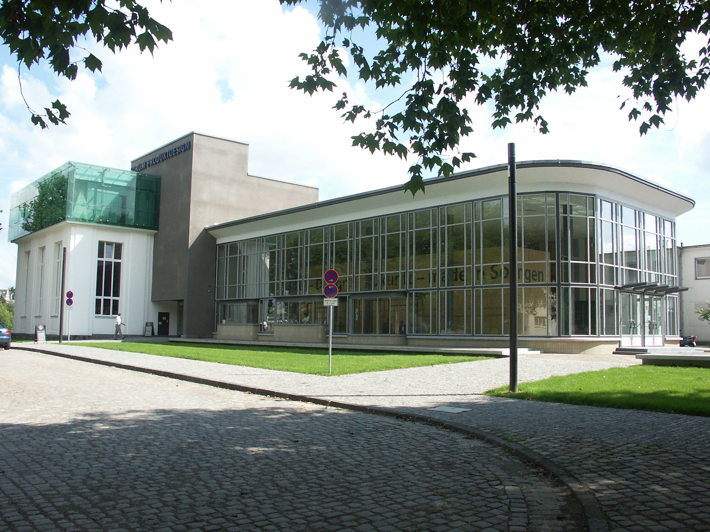 Das Bild zeigt das Forum Produktdesign, welches in den ehemaligen Hauptbahnhof Solingen einzog. Der Hauptbahnhof und sein Umfeld war ein ziemlicher Schandfleck. Im Rahmen der Regionale 2006 mausert sich die alte Bahnanlage zu einem schönen Park mit dem architektonisch behutsam umgebauten Bahnhofsgebäude. Die Funktion des ursprünglichen Bahnhofs übernehmen zwei neue Haltepunkte.